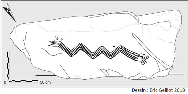 Rock 1088 design Eric Gelliot 2018 PRAG